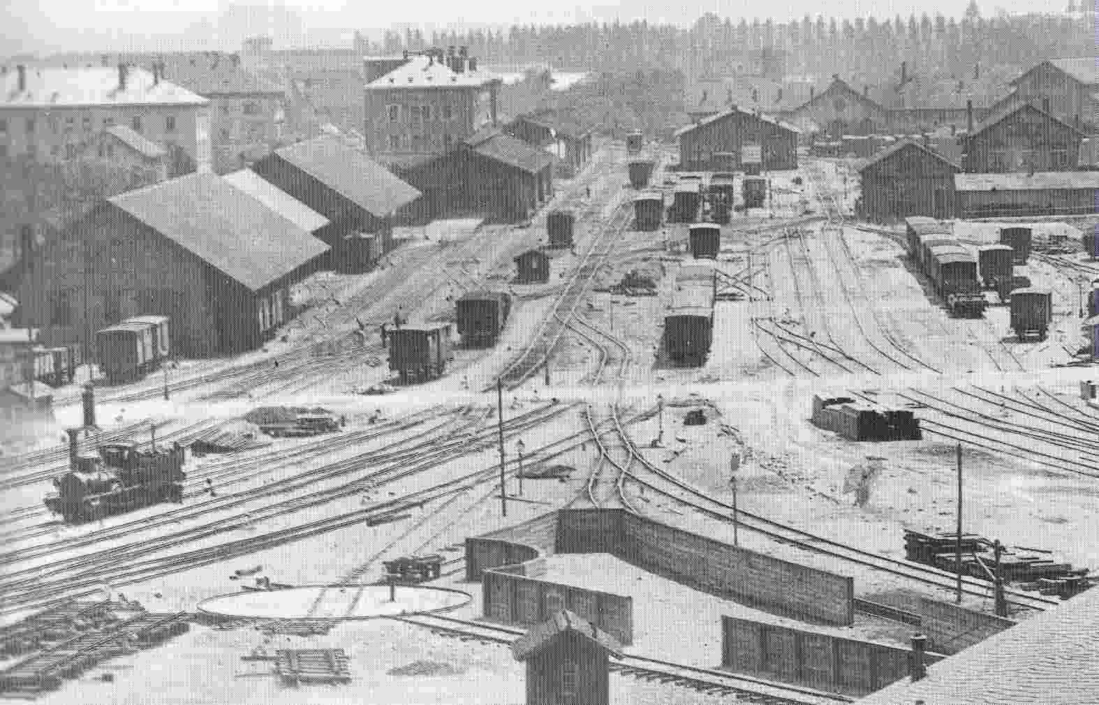 Bahnhof und Betriebswerkstätten in Ulm von Norden aus gesehen: im Vordergrund Teile des nördlichen Betriebswerkes (später Bw Ulm Hbf), im Hintergrund halbrechts der Wagenschuppen des ersten Betriebswerkes Ulm, im Hintergrund links Bahnsteige und Bahnhofsgebäude des Bahnhofs Ulm, ganz hinten Gebäude des Betriebswerkes der Bayerischen Staatsbahnen